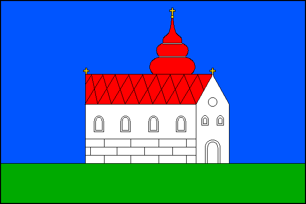 vlajka, Nový Malín, okres Šumperk